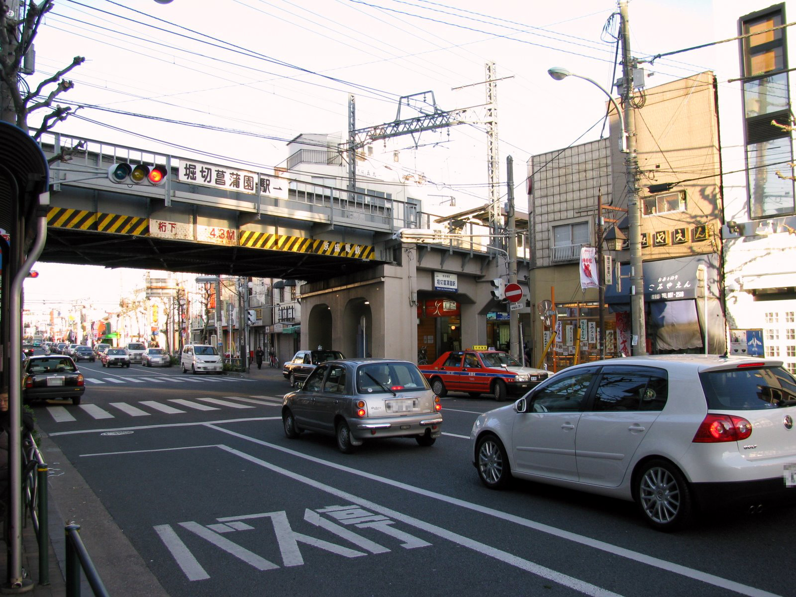 京成電鉄堀切菖蒲園駅